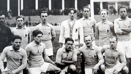 Equipe de France de football aux Jeux Olympiques de 1920. Debout : Léon Huot, Jean Batmale, Albert Parsis, Édouard Baumann, François Hugues, René Petit. Accroupis : Jules Devaquez, Jean Boyer, Paul Nicolas, Henri Bard, Raymond Dubly.